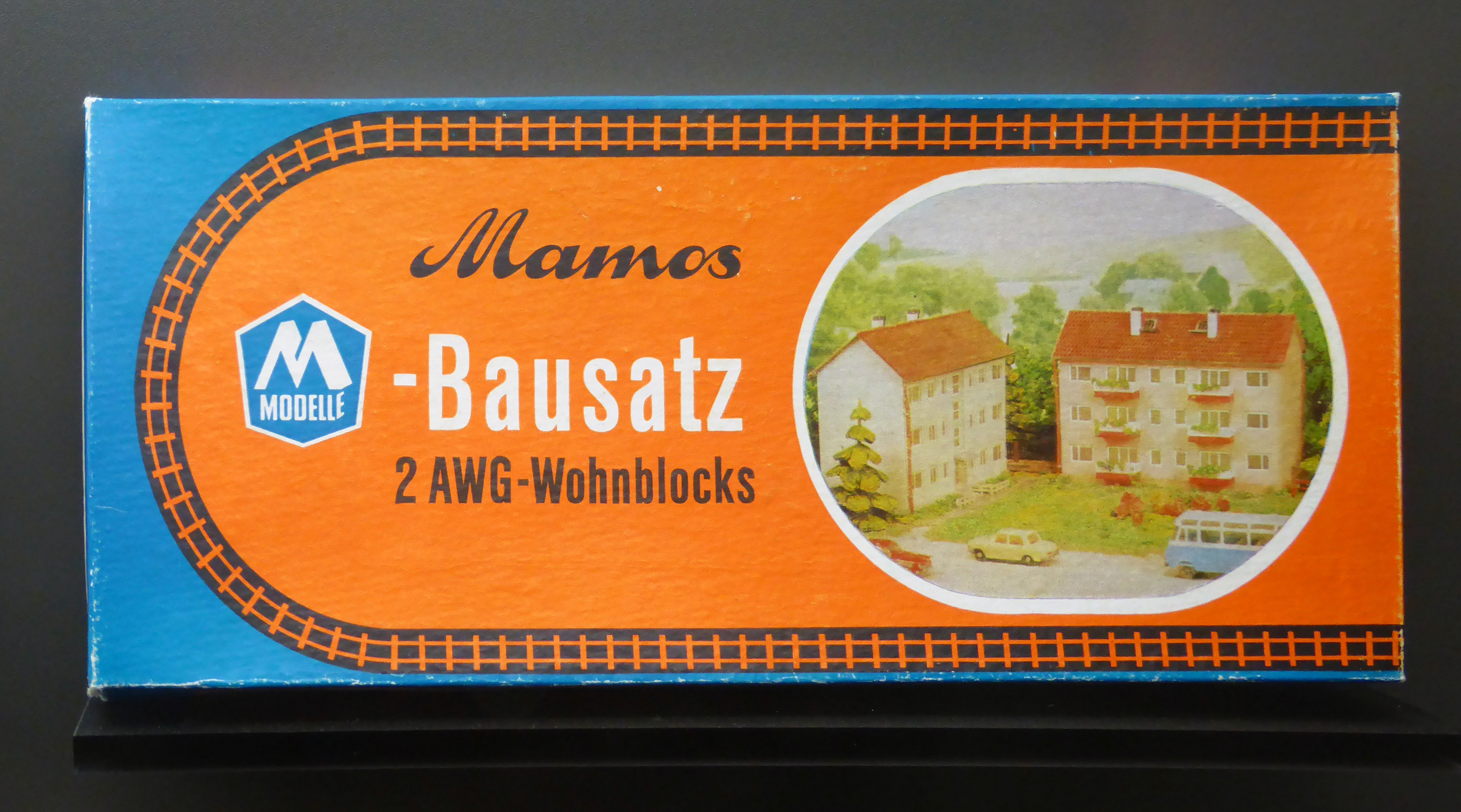 Mamos-Verpackung: AWG-Wonhnblocks um 1970. Ausgestellt im Museum sächsisch-böhmisches Erzgebirge in Marienberg.